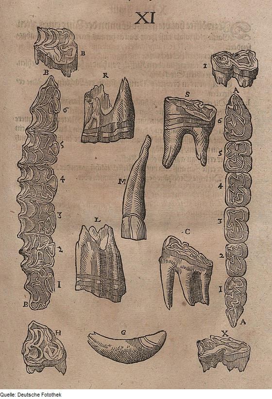 Original image description from the Deutsche Fotothek Biologie & Veterinärmedizin & Pferd & Zahn